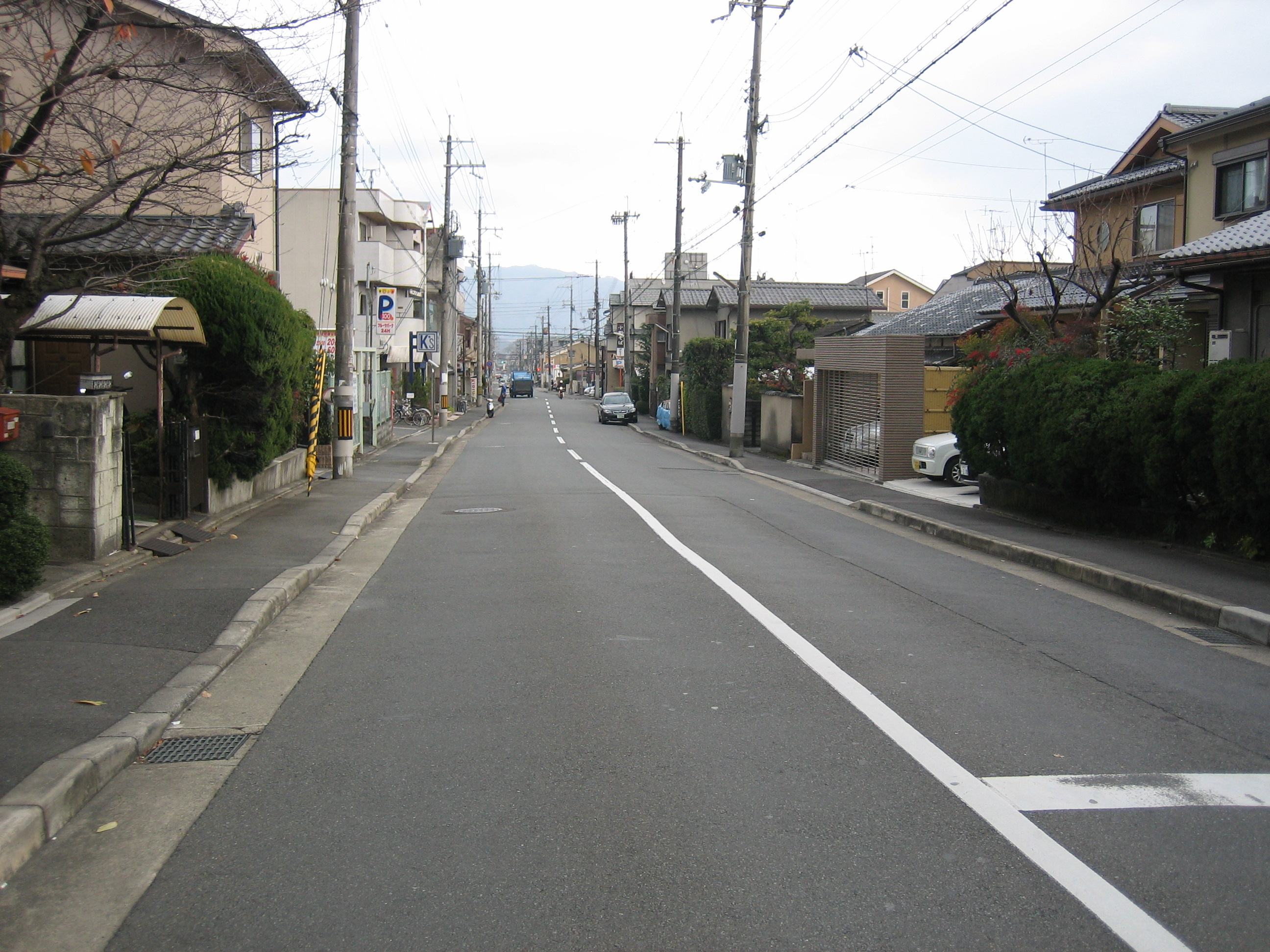 玄以通を京都市北区紫竹北大門町から撮影